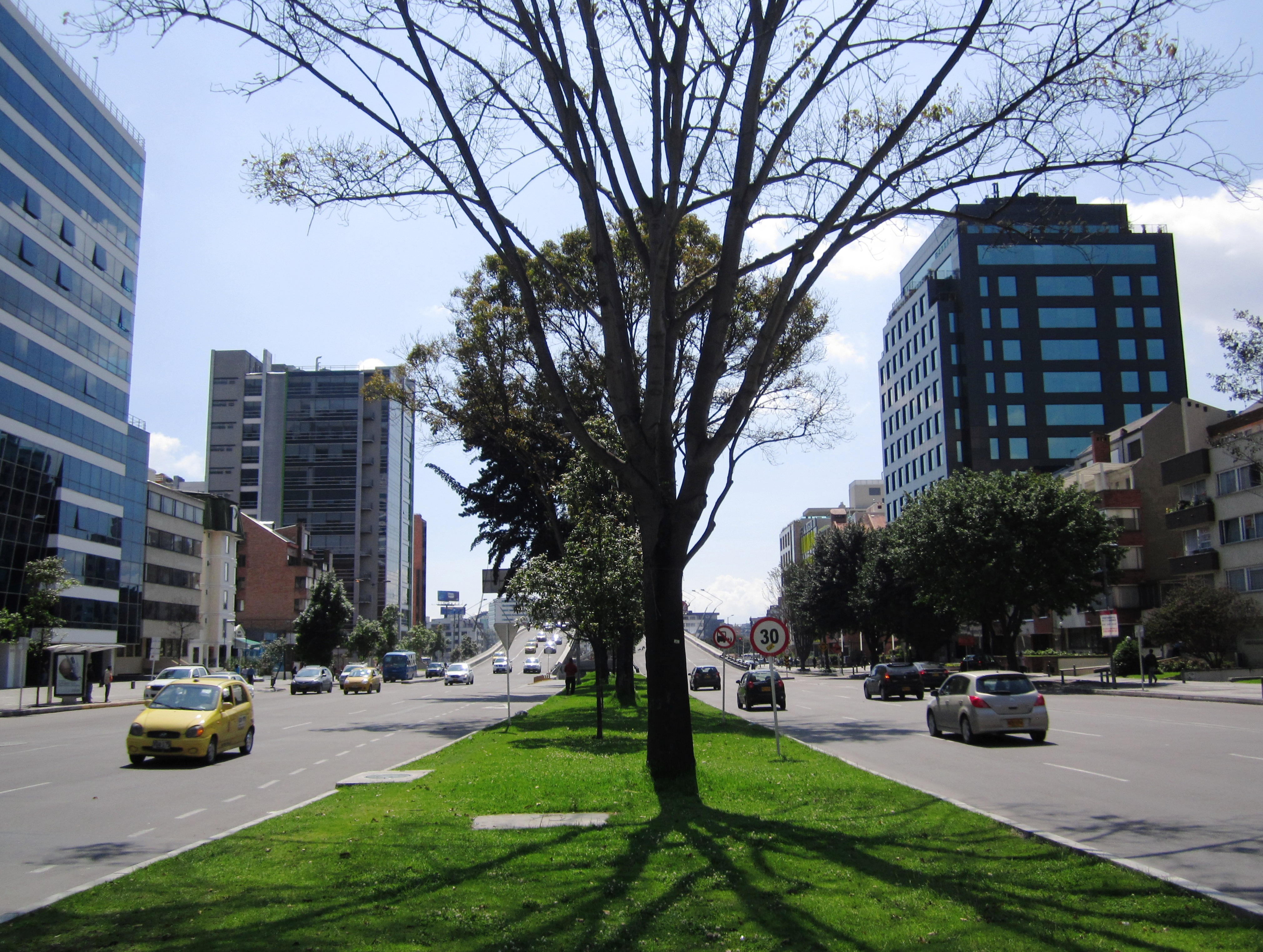 Bogotá avenida calle 100 entre carreras 11 y 15. Barrio Chicó.